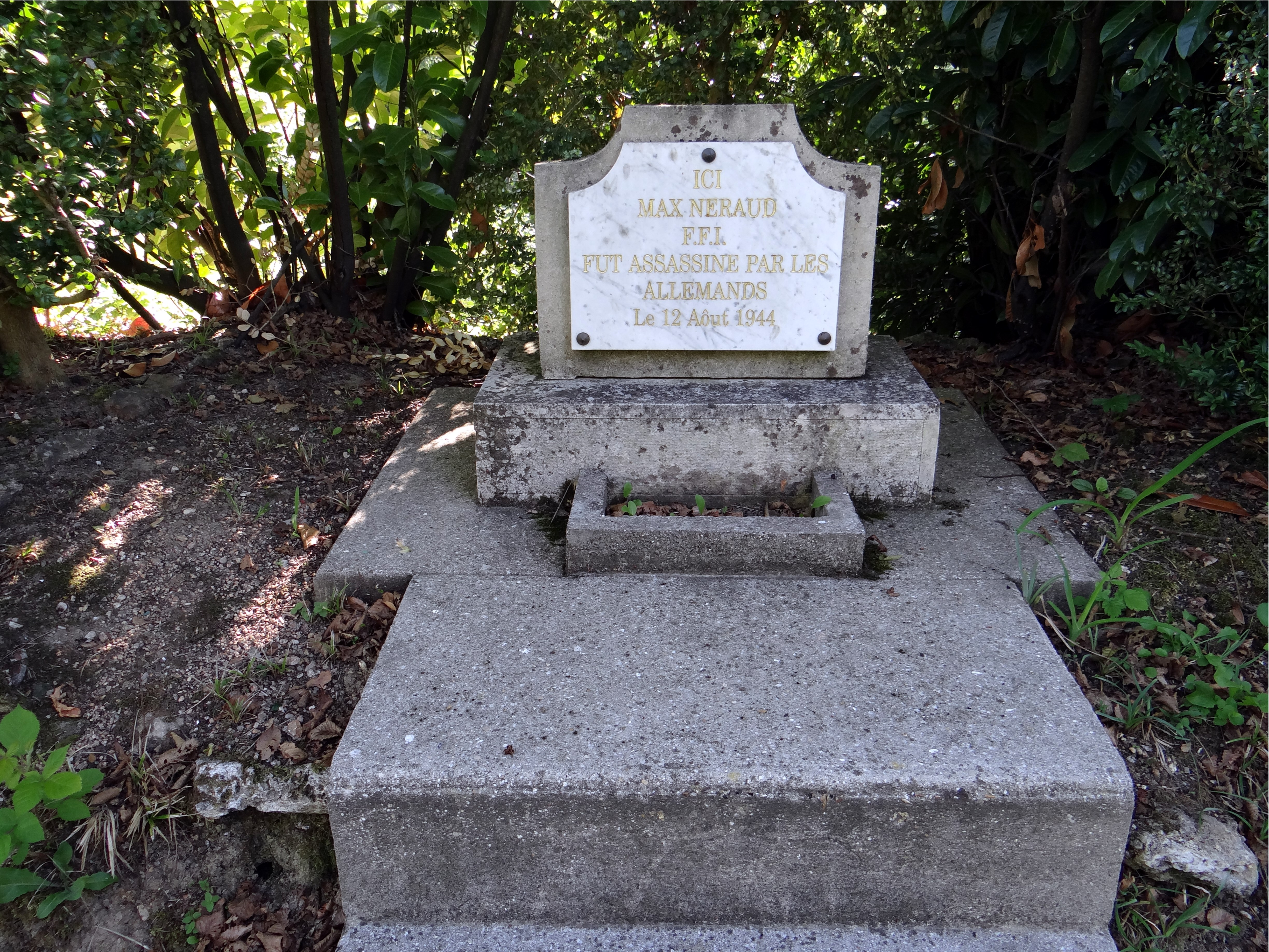 Stèle de Max Néraud, dans la forêt de Crécy-la-Chapelle, route de Crèvecoeur-en-Brie, commune de Mortcerf, Seine-et-Marne, région Île-de-France.